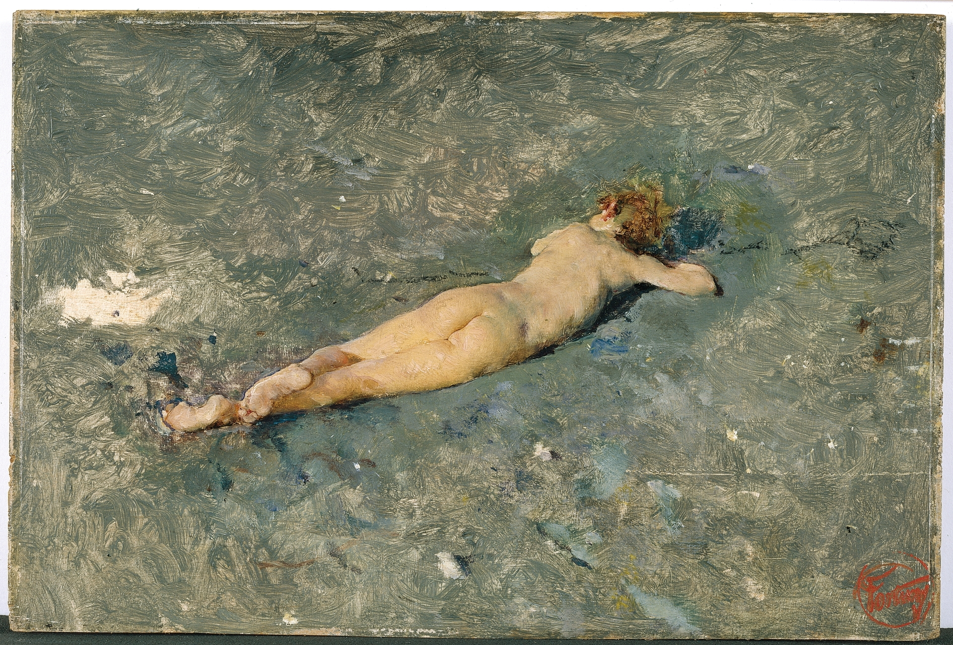 Obra de arte del pintor Mariano Fortuny. Siglo XIX